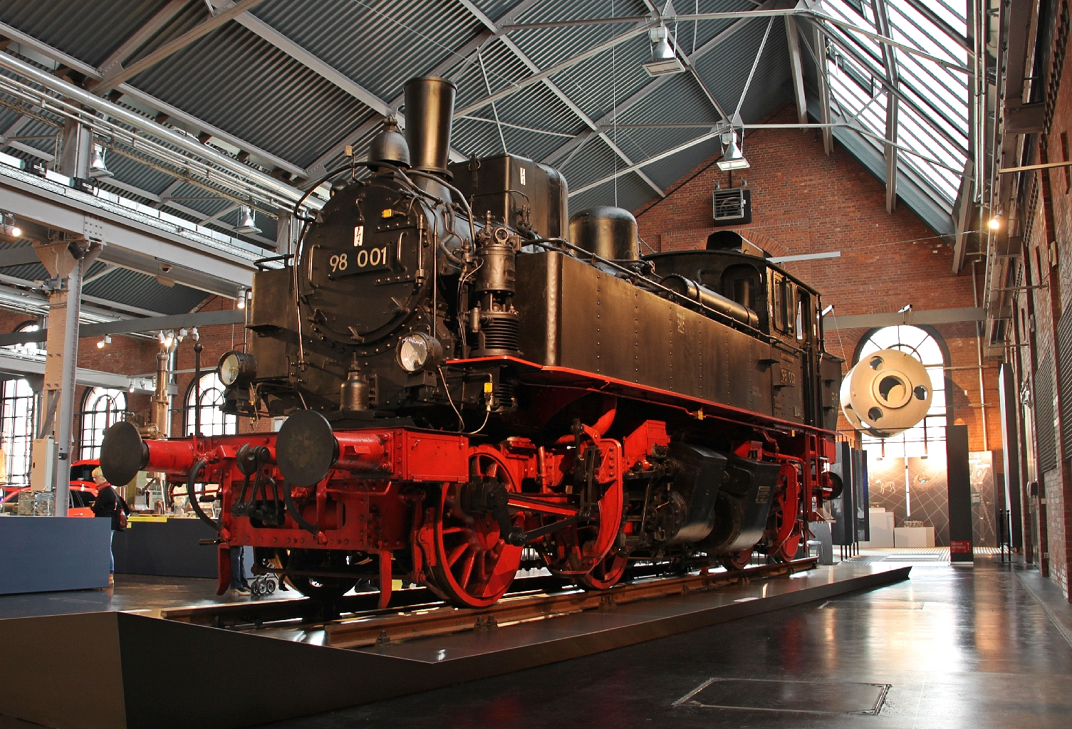 Industriemuseum Chemnitz: Dampflokomotive der Gattung I TV (Sächsische I TV), von der Königlich Sächsischen Staatseisenbahn für den Betrieb auf der Windbergbahn beschafft, in der Deutschen Reichsbahn als Baureihe 98.0 bezeichnet, die 98 001 (ex I TV 1394) blieb bis heute erhalten und gehört zum Bestand des Verkehrsmuseums Dresden, sie befindet sich als Leihgabe im Sächsischen Industriemuseum in Chemnitz.